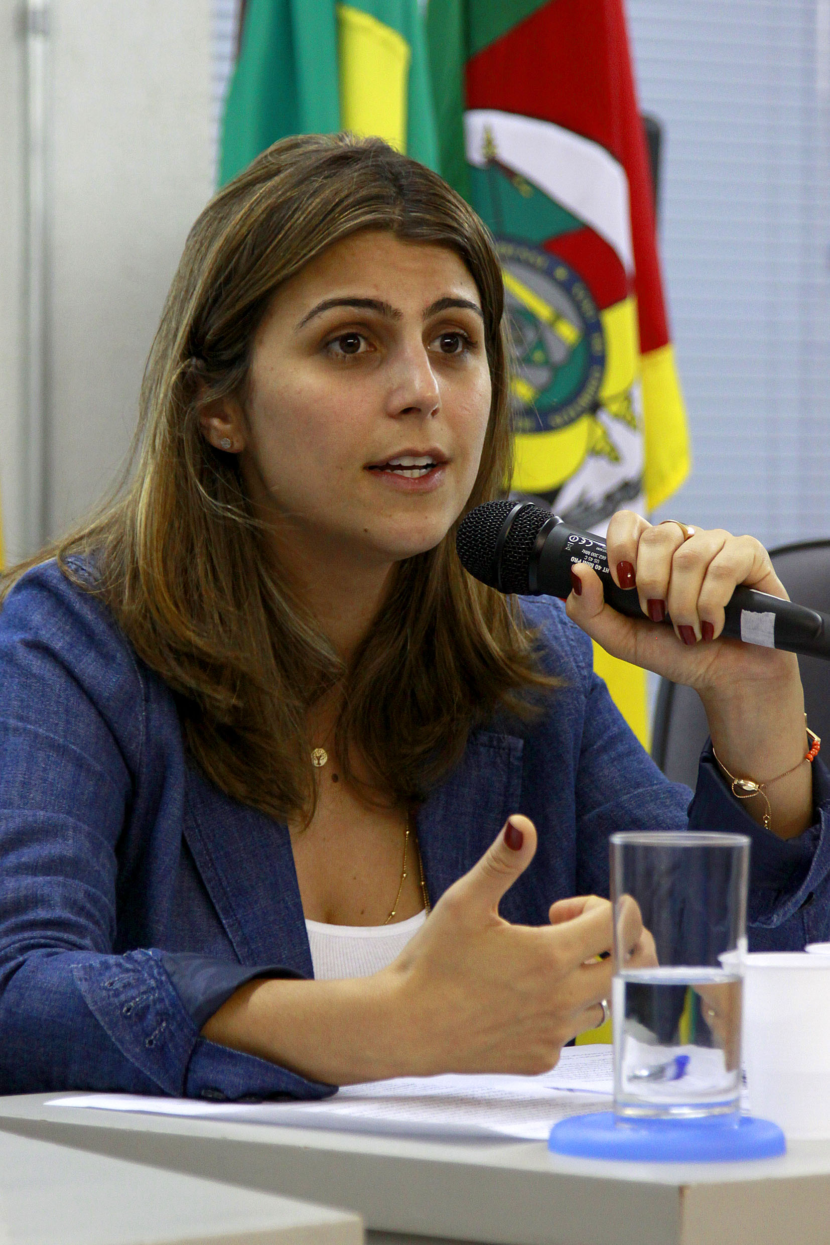 Manuela d'Ávila no Conselho Regional de Farmácia em 21 de agosto de 2012.